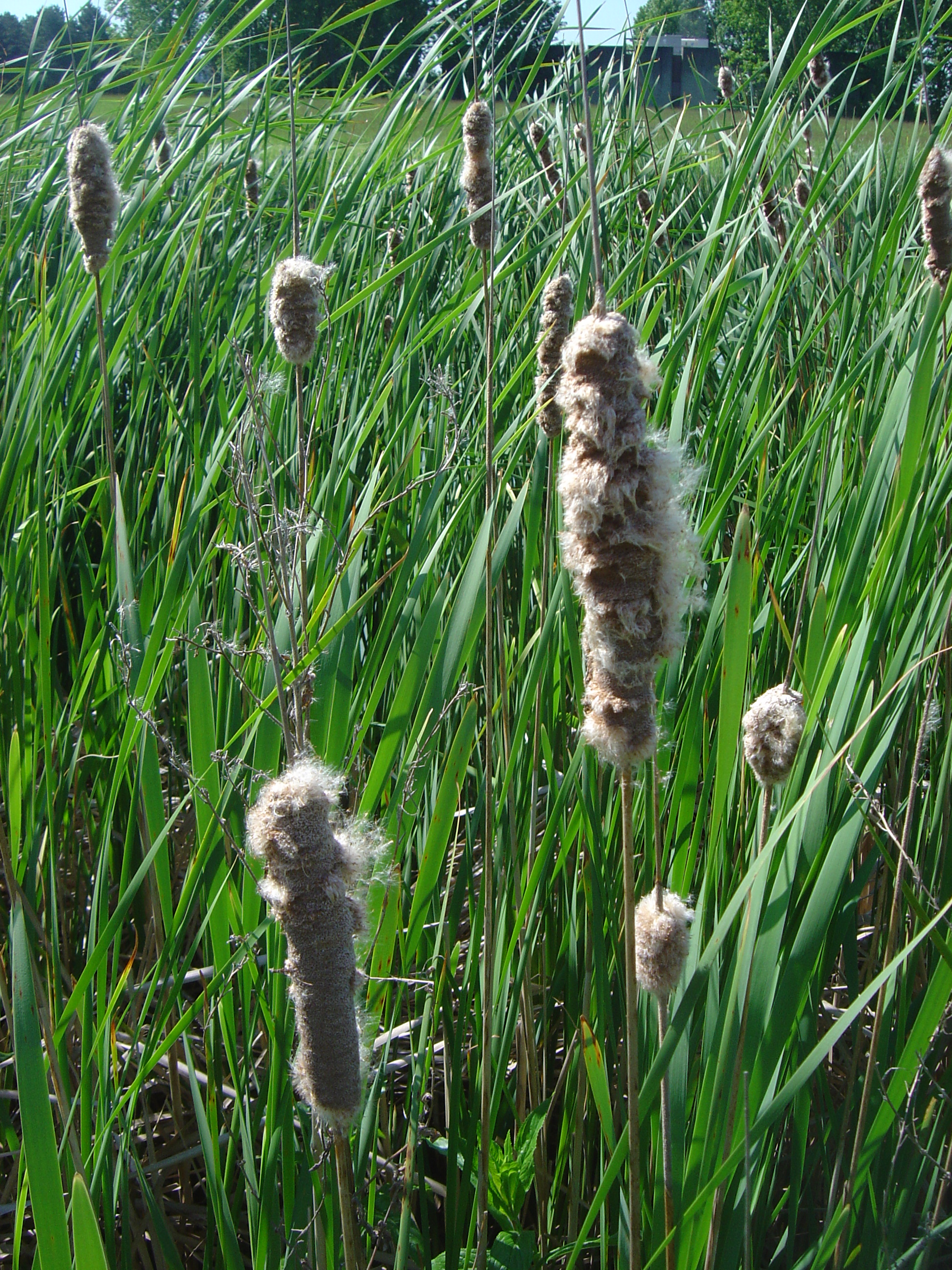 Reeds